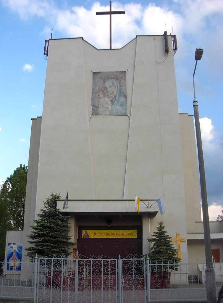 Kościół NMP Matki Kościoła w Bydgoszczy na Górzyskowie